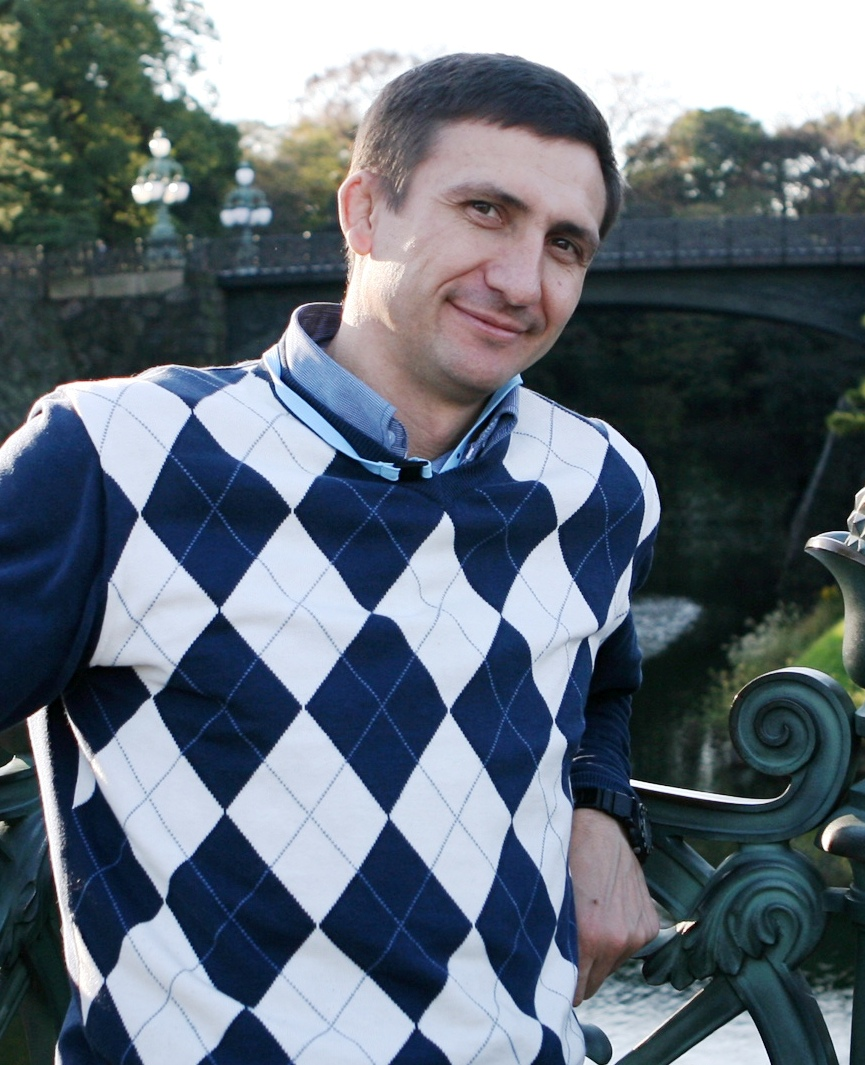 Ларюков Анатолий Владимирович (Федерация дзюдо России)